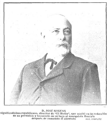 Retrato de José Nakens, fotografía de Manuel Compañy recogida en la revista española Nuevo Mundo.